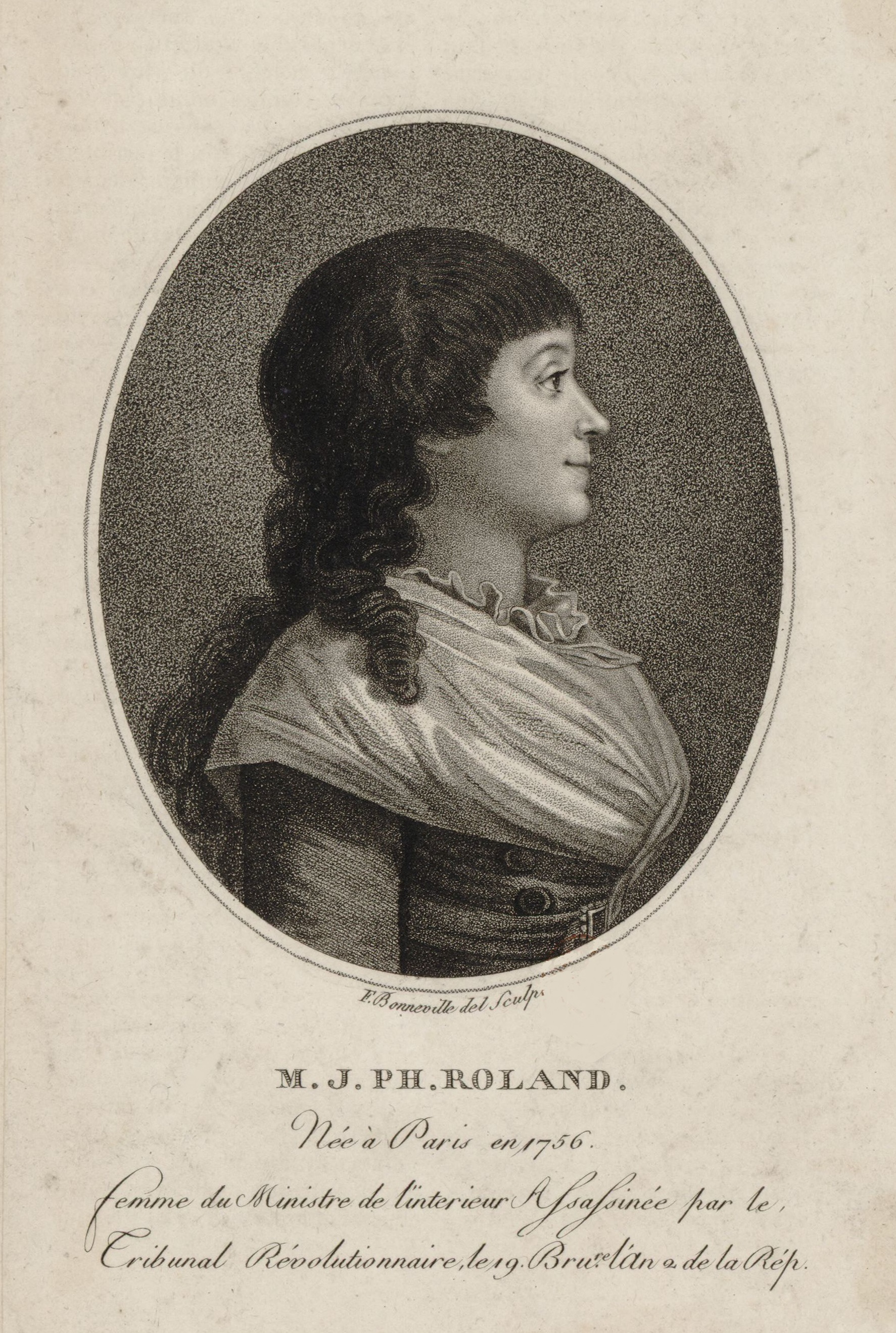 M.J.Ph. Roland née à Paris en 1756, femme du ministre de l'Intérieur assassinée par le tribunal révolutionnaire, le 19 bru.re l'an 2 de la Rép., estampe.